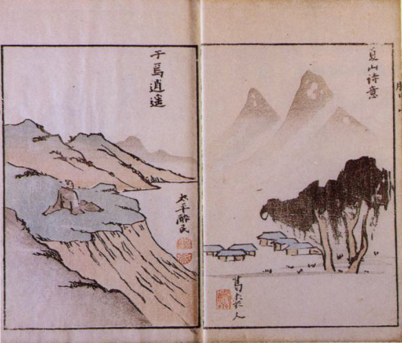 『胸中山』亀田鵬斎の著作物